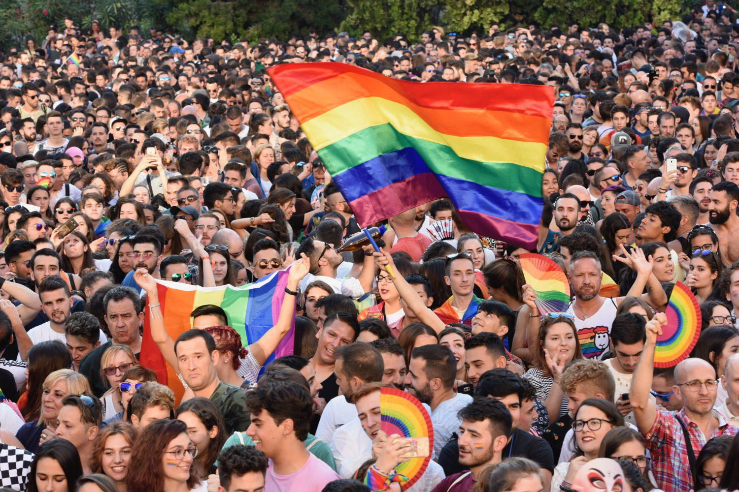 Arranca oficialmente el MADO Madrid Orgullo 2018 después de que anoche, miércoles 4 de julio, tuviera lugar el pregón en la plaza de Pedro Zerolo al que acudieron numerosos miembros de la corporación municipal.